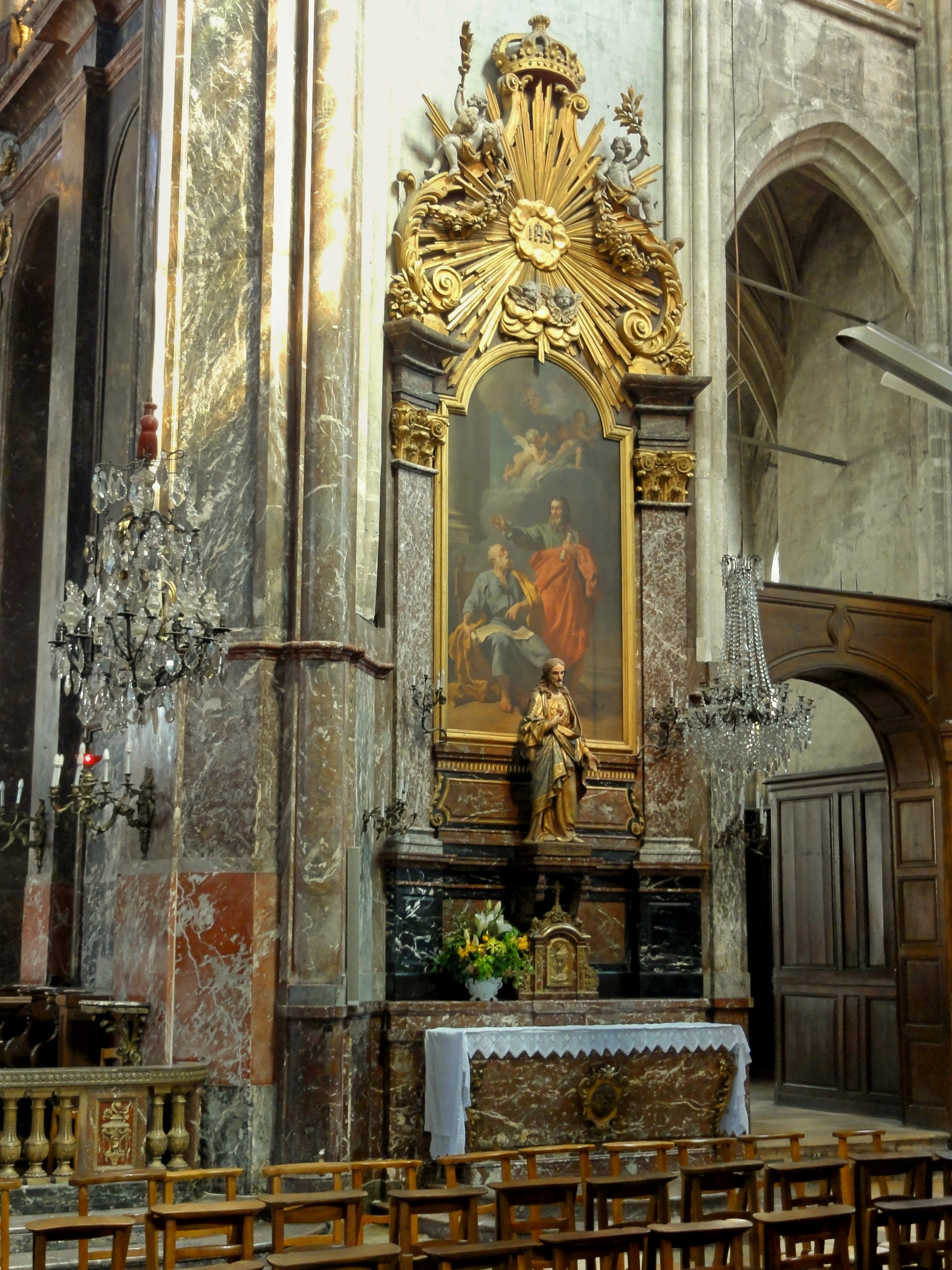 Autel secondaire de droite. Le tableau d'autel représentant Saint Pierre et saint Paul est une œuvre de Nicolas Guy Brenet datée de 1774.